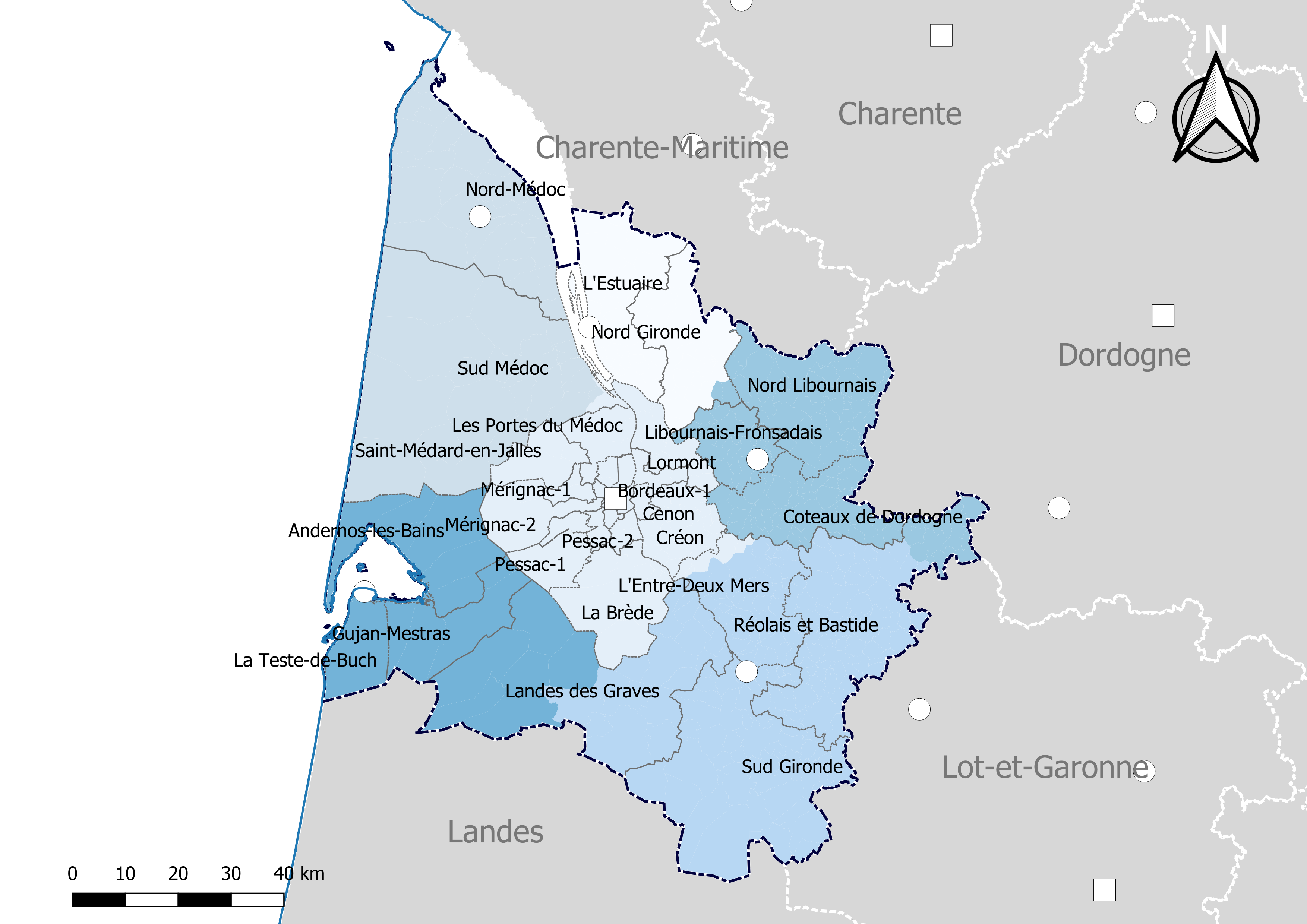 Carte du découpage cantonal du département des Landes, avec en surimpression les arrondissements (en nuances de bleu) - Carte arrêtée au 1er janvier 2019.